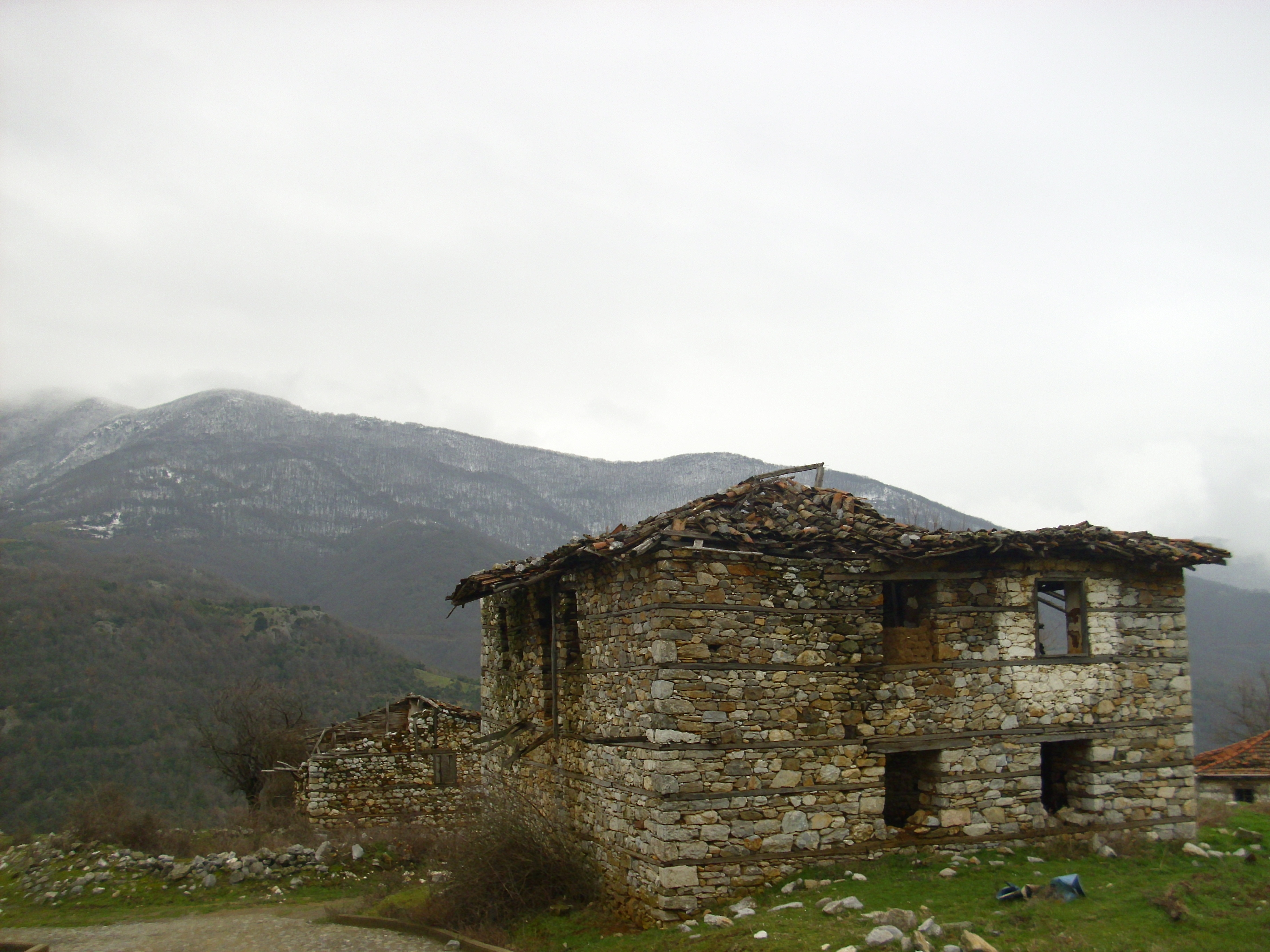 Къща в село Корнишор, днес Република Гърция.